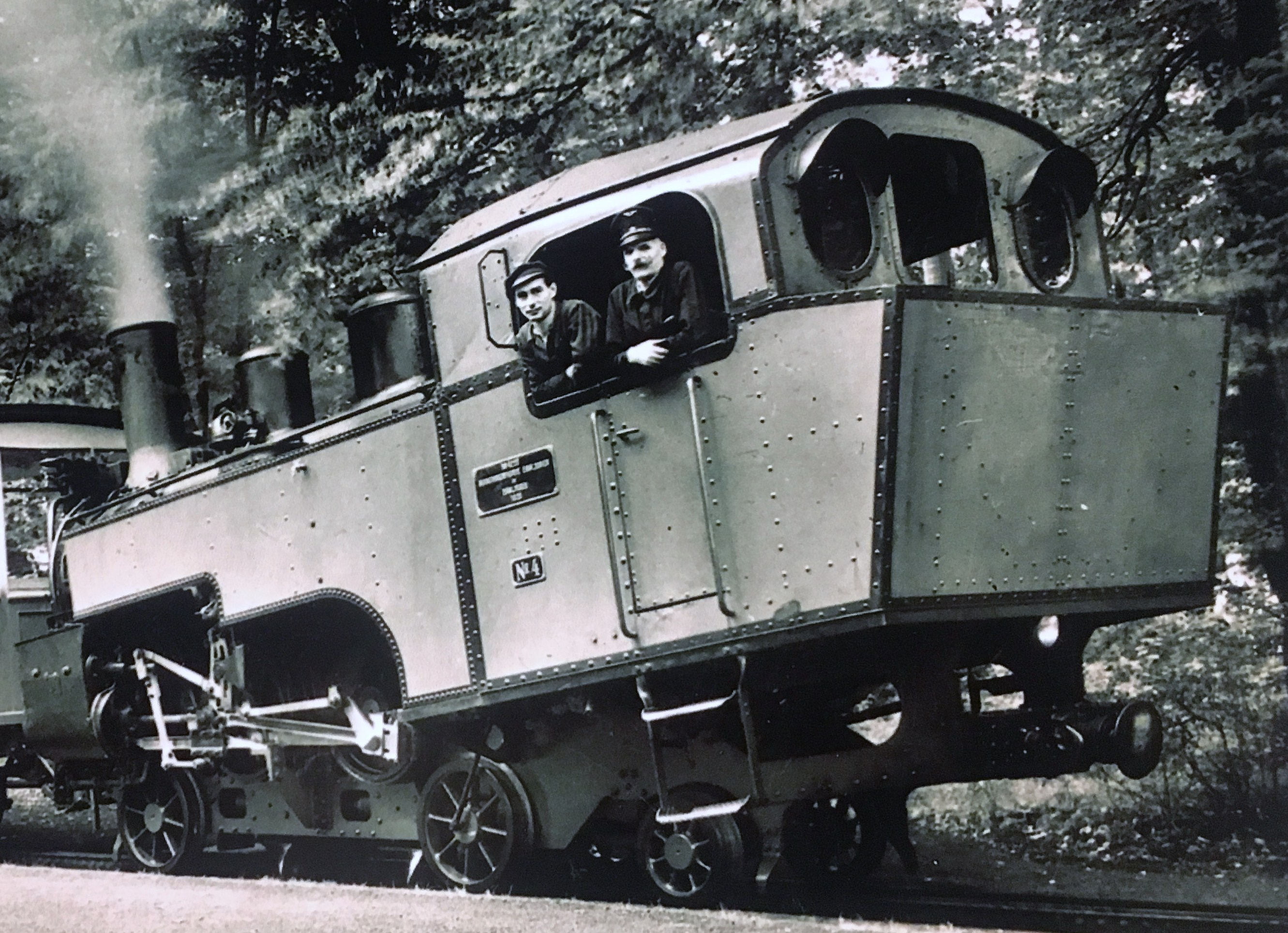 Drachenfelsbahn und Petersbergbahn, Dampflok 4, ME 4220/1928